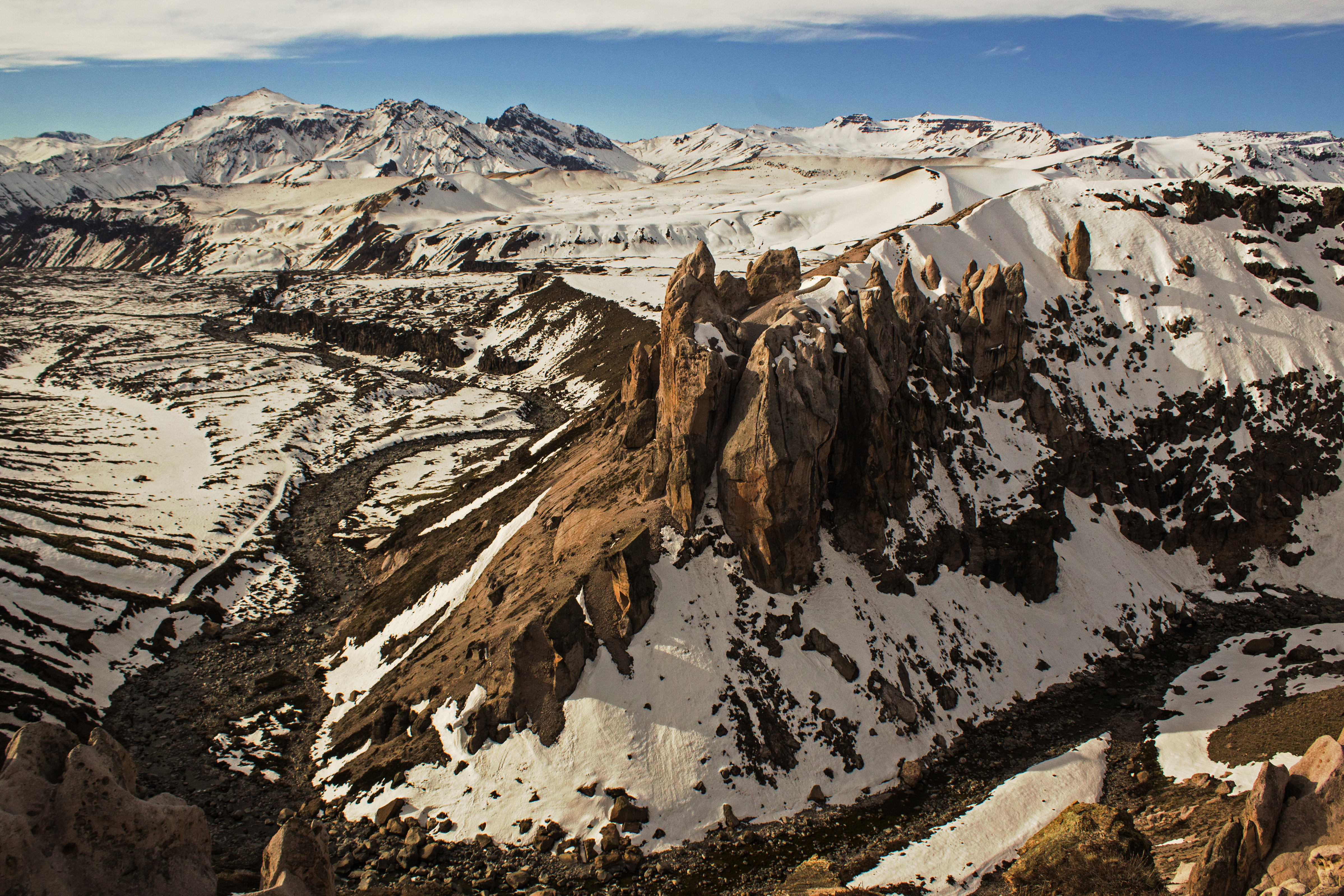 Monjes Blancos, hito montañoso localizado en las inmediaciones del paso fronterizo Pehuenches, comuna de San Clemente, Región del Maule, Chile.